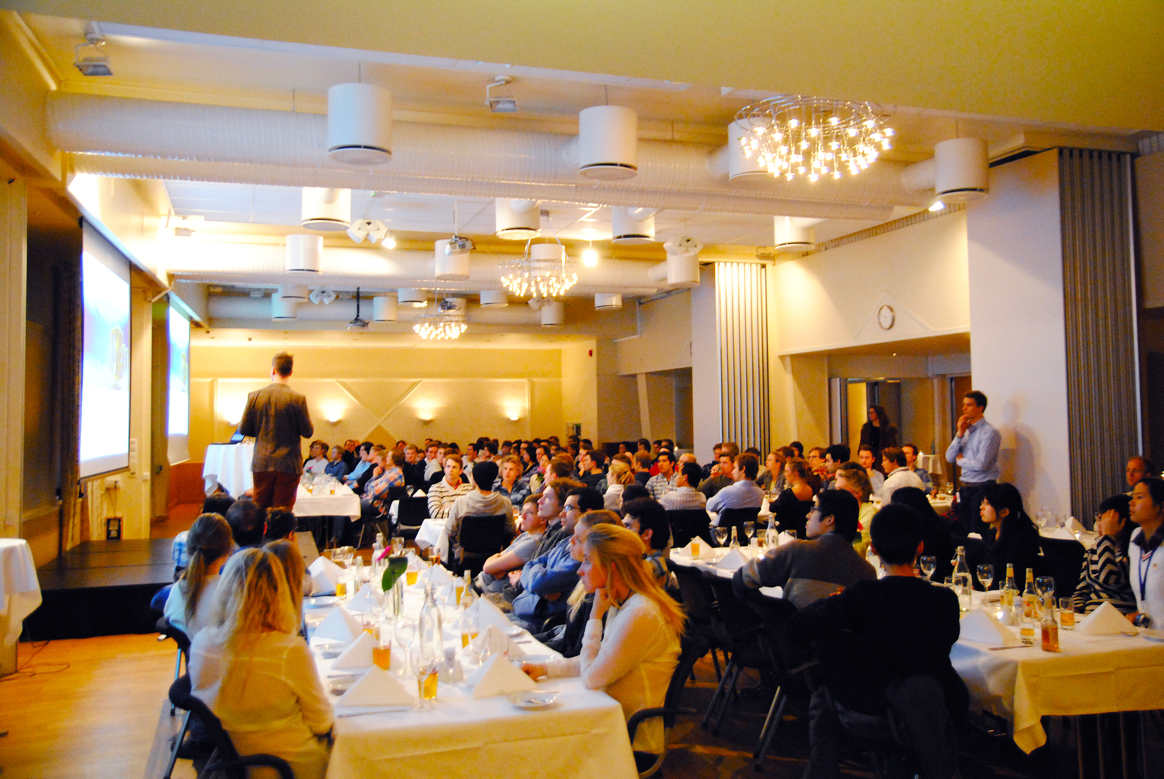 Fra en av Teknologiportens bedriftspresentasjoner